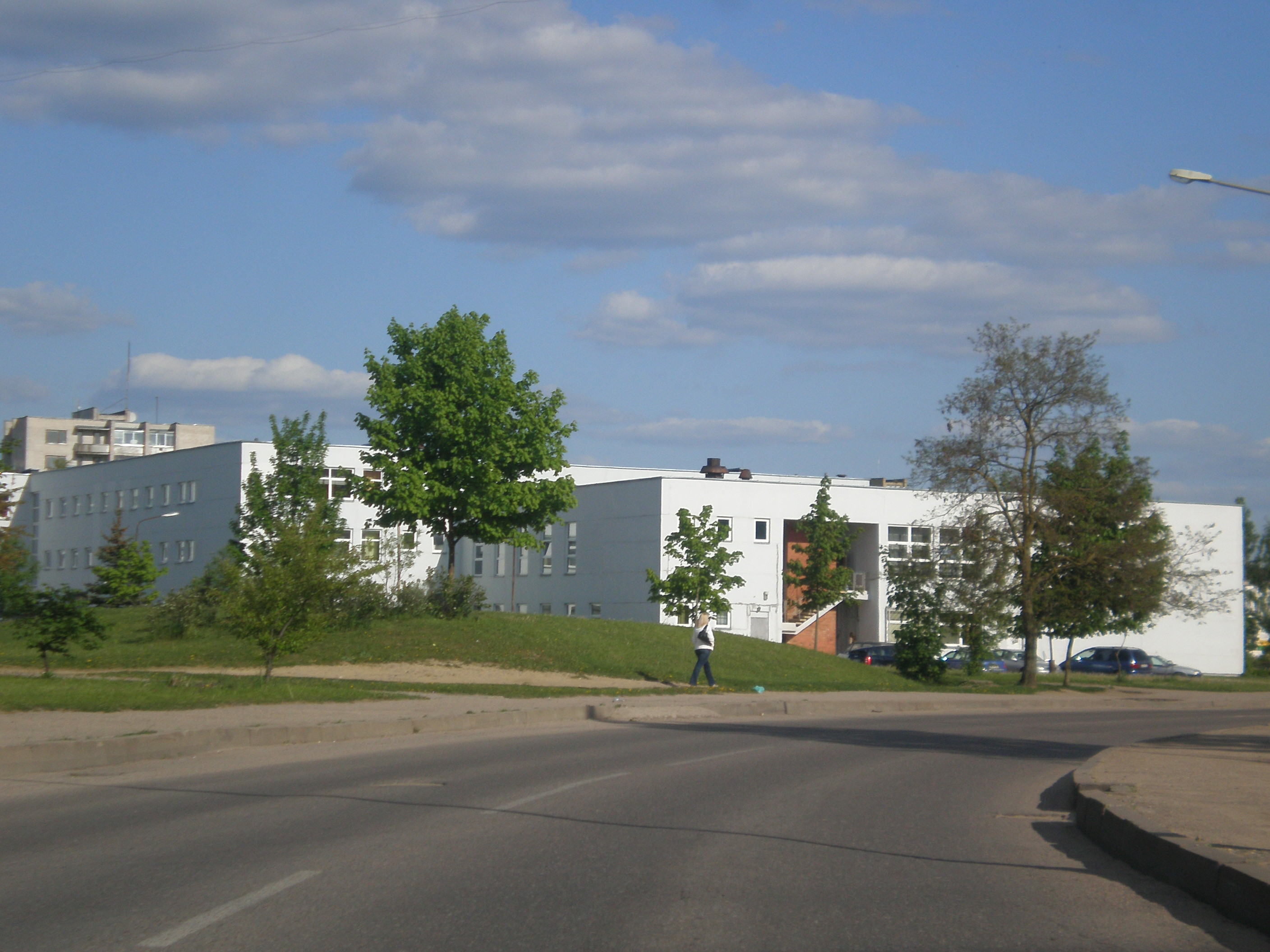 J. Vareikio pagrindinė mokykla